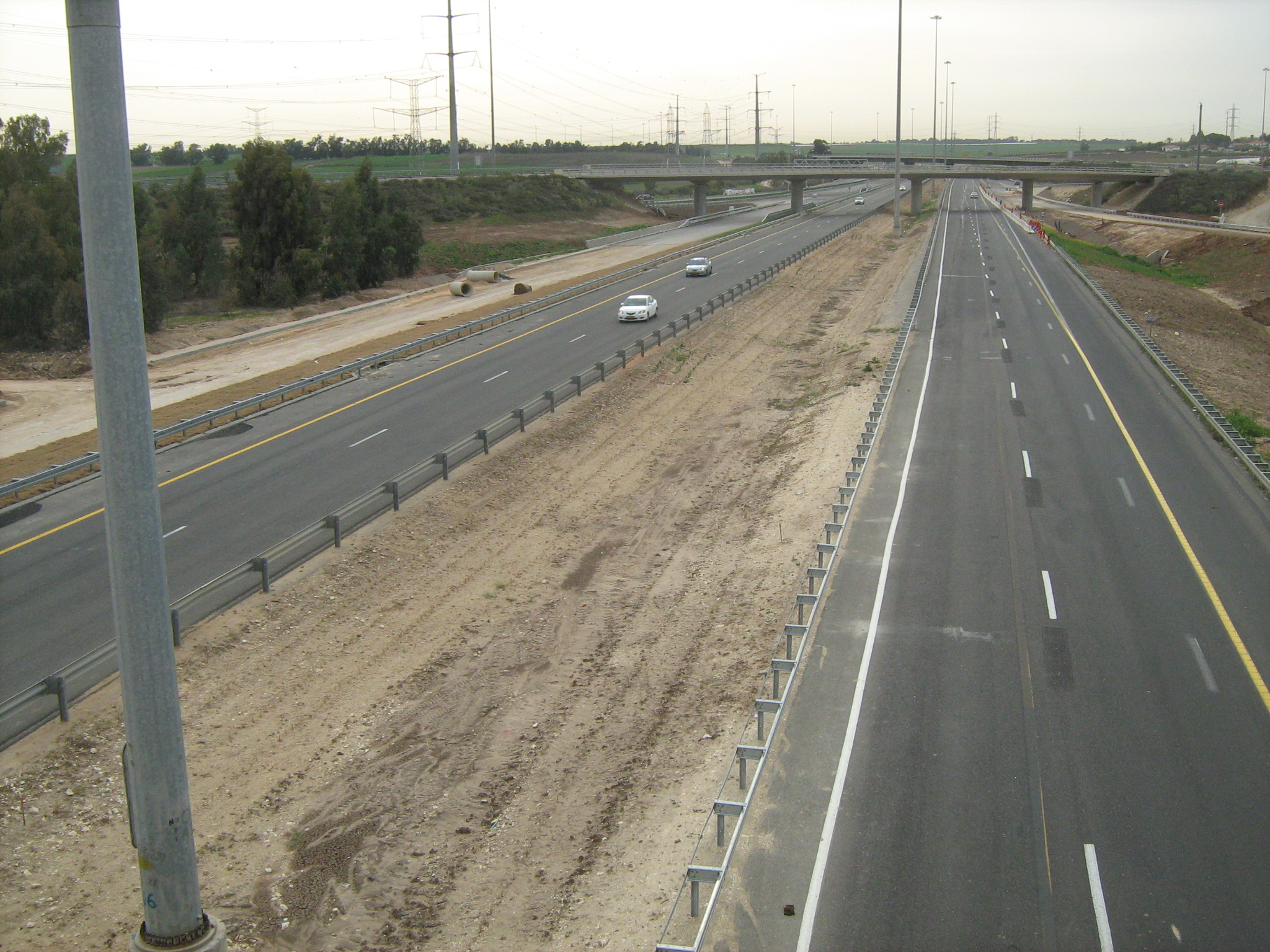 מחלף נשרים - מראה דרומה מכביש 431 לעבר כביש 6